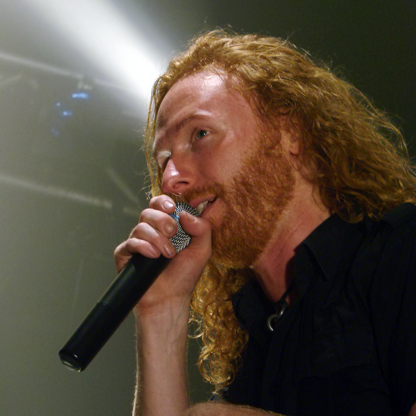 Dark Tanquillity, groupe suédois de Death Metal mélodique, en concert à la Locomotive, à Paris, le 28 Octobre 2008. Mikael Stanne.